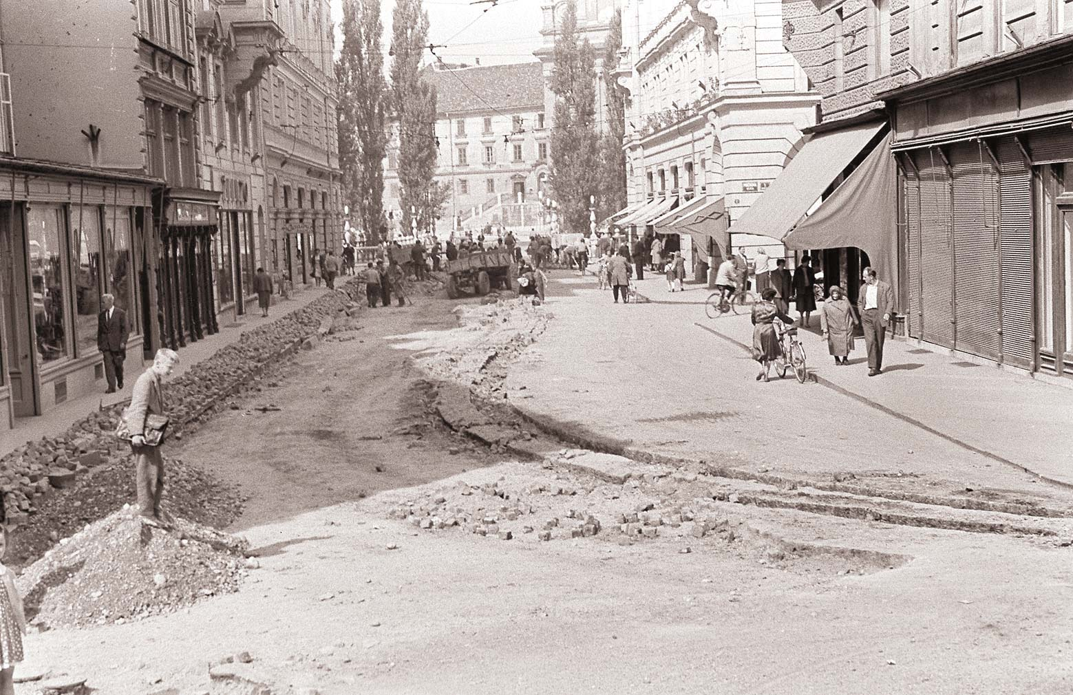 Odstranjevanje tramvajskih tirov z ljubljanskih ulic.